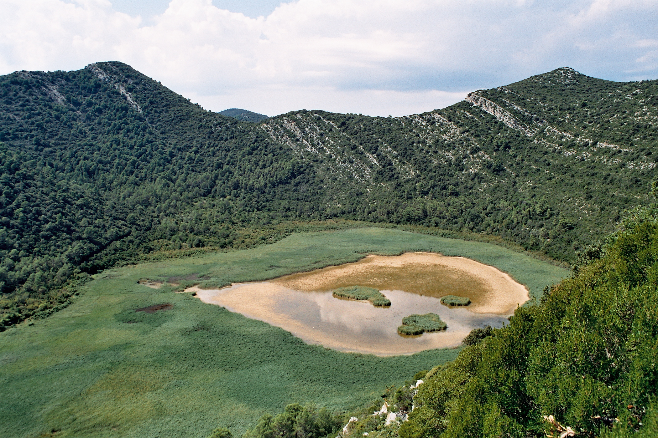 Blatina kod Blata na Mljetu. Mala i vrlo duboka jezera s izvorima bočate vode.